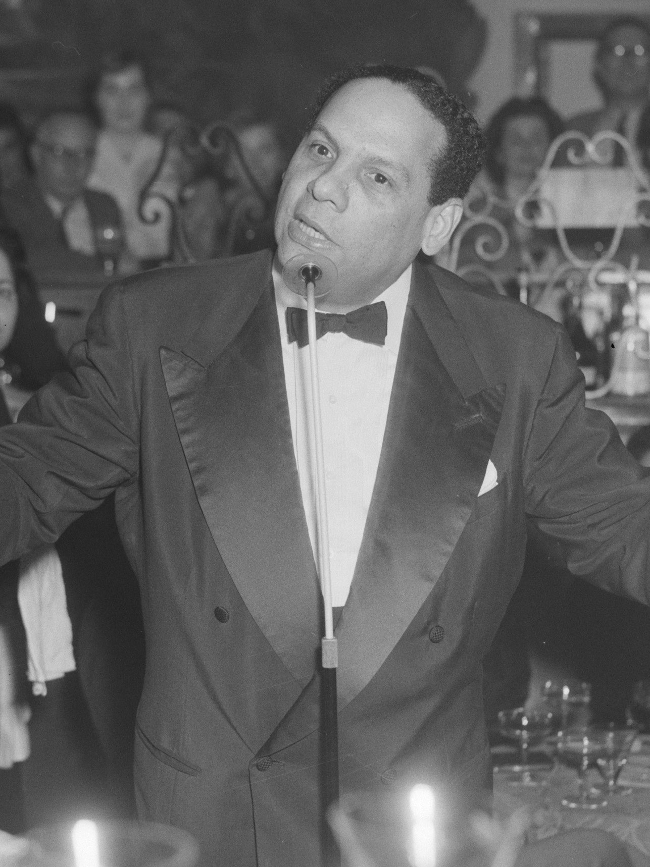 Collectie / Archief : Fotocollectie Anefo Reportage / Serie : [ onbekend ] Beschrijving : Edmundo Ros met Max Woiski op Schiphol Datum : 5 maart 1957 Locatie : Noord-Holland, Schiphol Fotograaf : Pot, Harry / Anefo Auteursrechthebbende : Nationaal Archief Materiaalsoort : Negatief (zwart/wit) Nummer archiefinventaris : bekijk toegang 2.24.01.04 Bestanddeelnummer : 908-3748